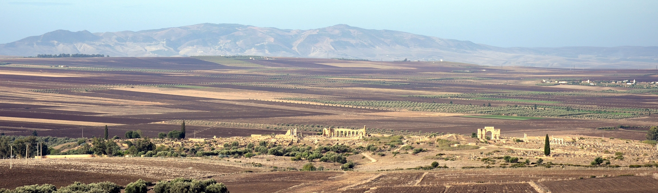 Вид на Волюбилис с востока. View of Volubilis from the east.